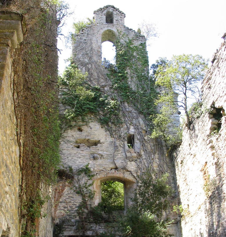 Trespondeko Done Kattalin monastegiko kanpaidorrearen hondarrak.